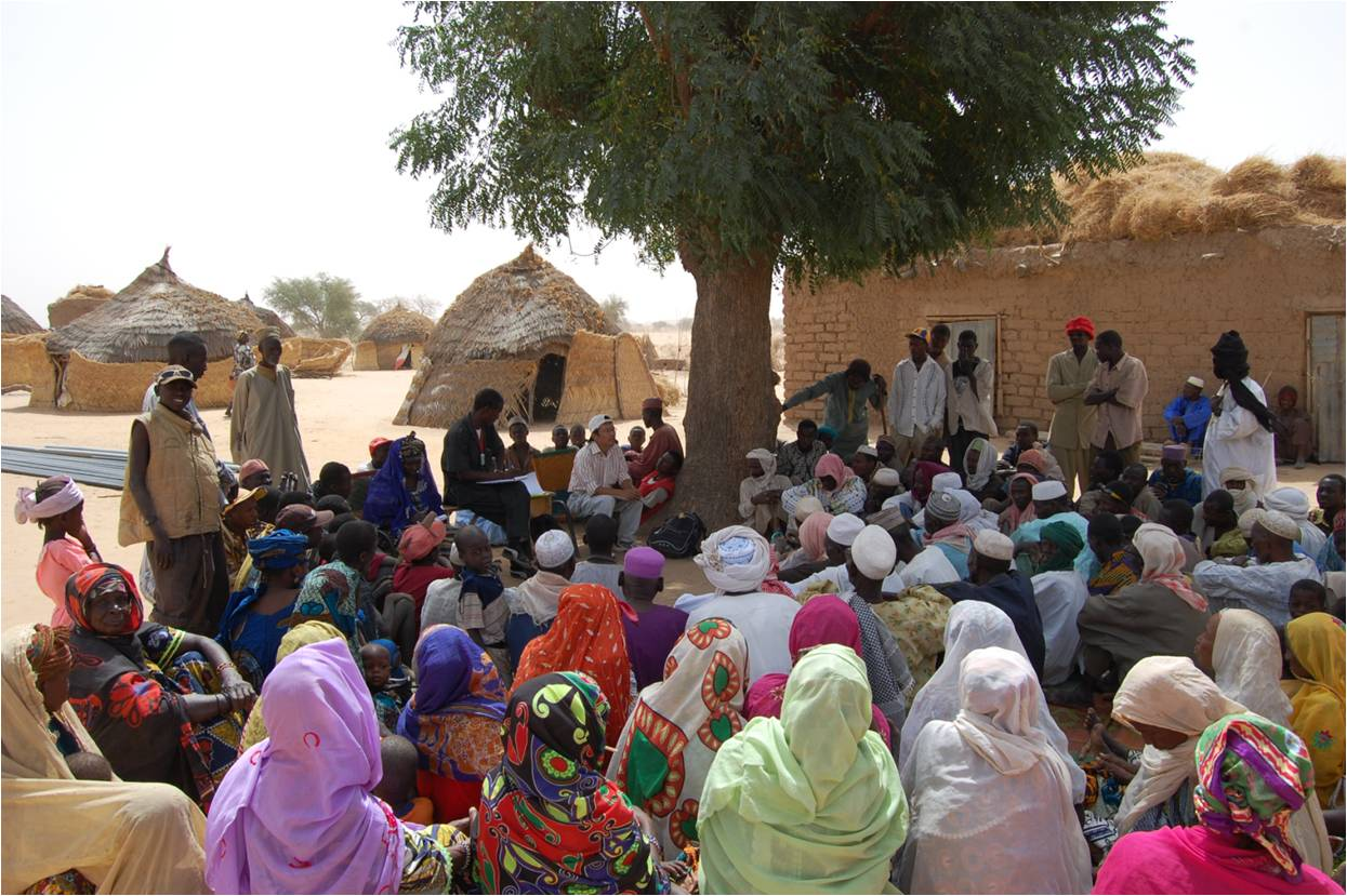 JIRCAS「アフリカ土壌」プロの村での研究活動について農民集会で説明するJIRCAS研究員 【ニジェール、ファカラ（モウレイコアラゼノ村）、2009年2月】